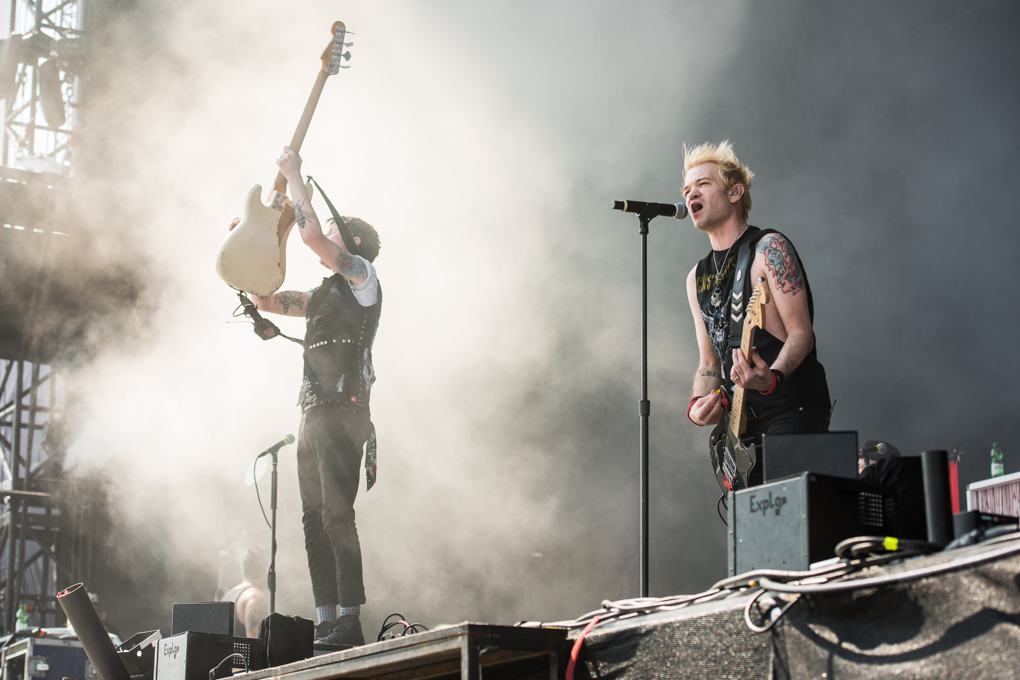 ARGO-Konzerte,Deryck Whibley,Jason McCaslin,Konzert,Livekonzert,Livemusik,Musik,RiP,Rock im Park 2017,Sum 41,Zeppelin Stage